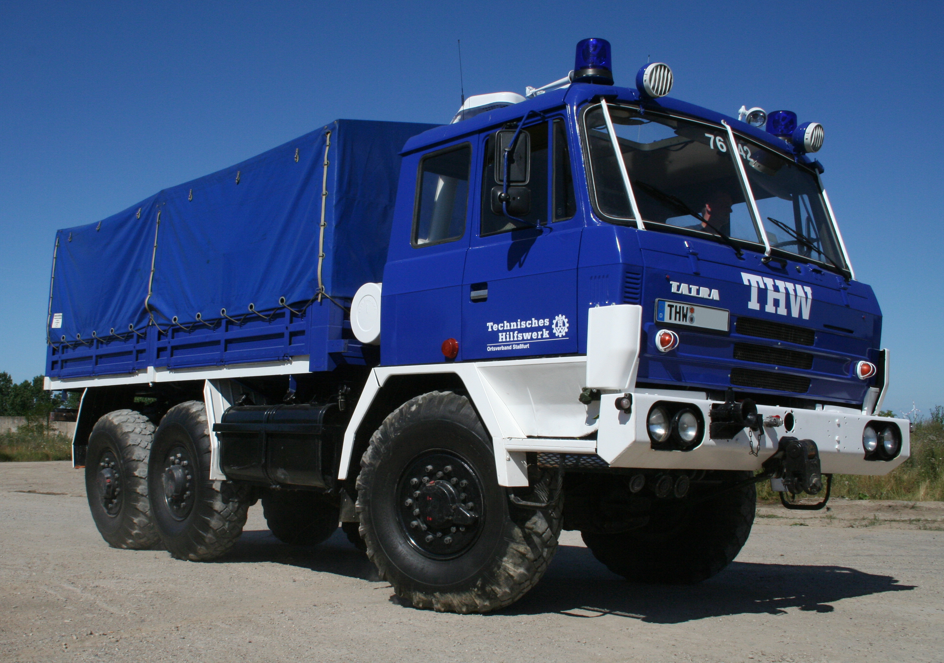 Tatra T815 Reworked version of Image:2006-07-15_tatra815_1.jpg (Stephan Czuratis (Jazz-face)), reworker: Smial